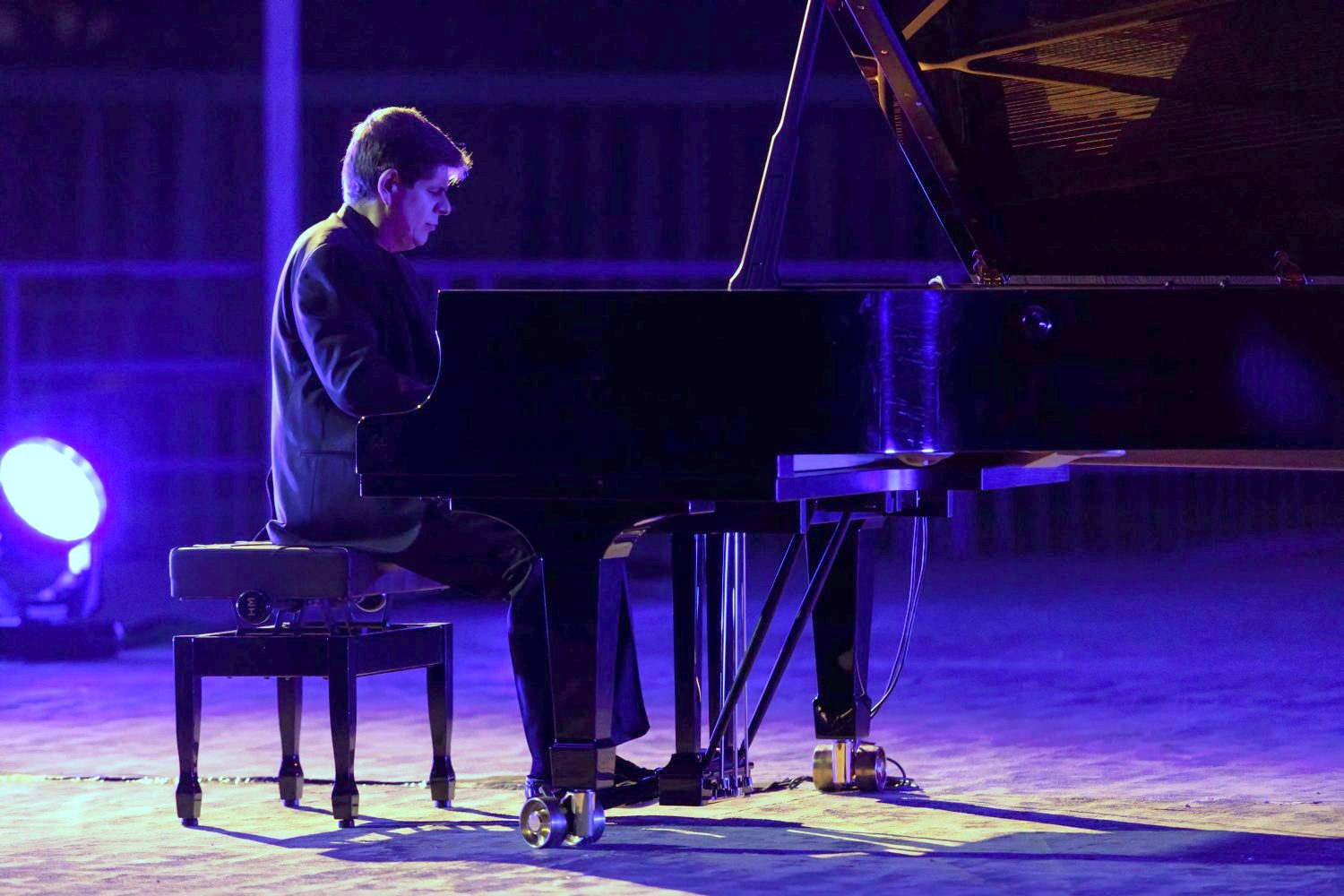 El extraordinario pianista Javier Perianes ofreció ayer un concierto al aire libre dentro de la programación de Veranos de la Villa, en un escenario mágico como es el auditorio del Parque de El Paraíso en San Blas (Canillejas). Ante un público entregado, el autor interpretó en la primera parte los preludios del Libro 1 de Debussy, y en la segunda a Manuel de Falla, con títulos tan conocidos como El Amor Brujo, mostrando una vez más su virtuosismo.